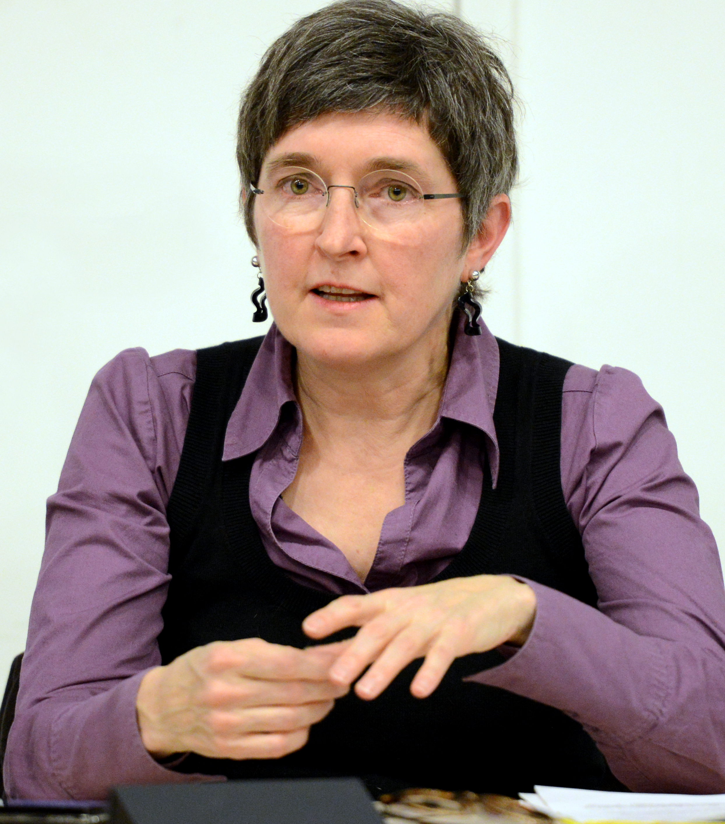 Podiumsdiskussioun «Iwwer d’Konsequenze vun Antisemitismus a Juddeverfolgung am politischen Discours zu Lëtzebuerg, 1945-2014» D'Konferenz gouf den 10. Dezember 2014 am Centre Prince Henri zu Walfer gehalen. Se war organiséiert vu MemoShoah Lëtzebuerg an Zesummenaarbecht mat der Fondation Robert Krieps an den Témoins de la 2ème génération. D'Historikerin Renée Wagener.